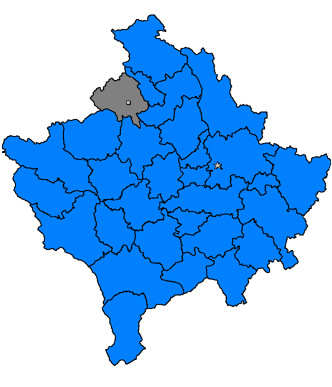 Zubin Potok, Kosovë 2006